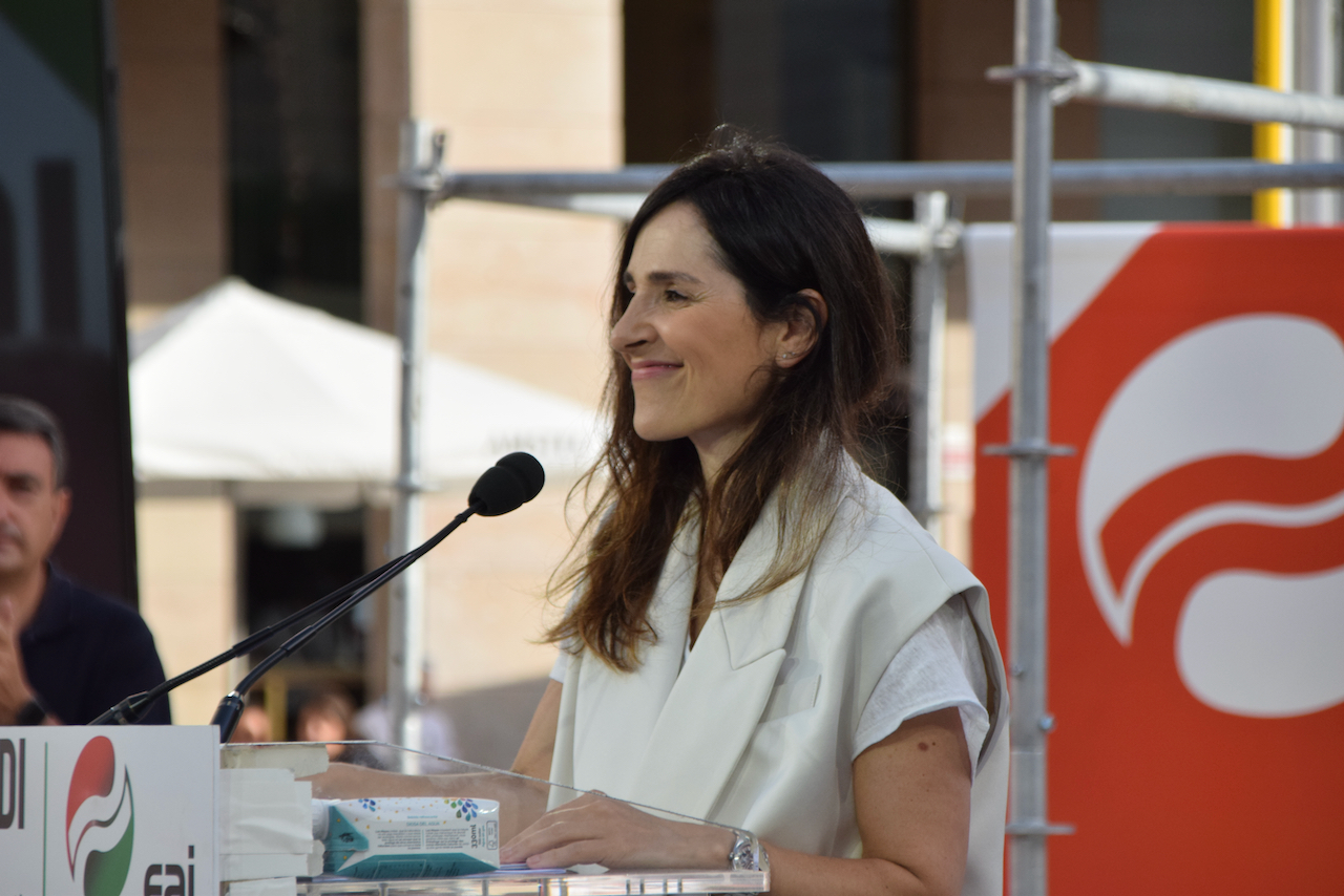 Antigua auzoko Julio Caro Baroja plazan